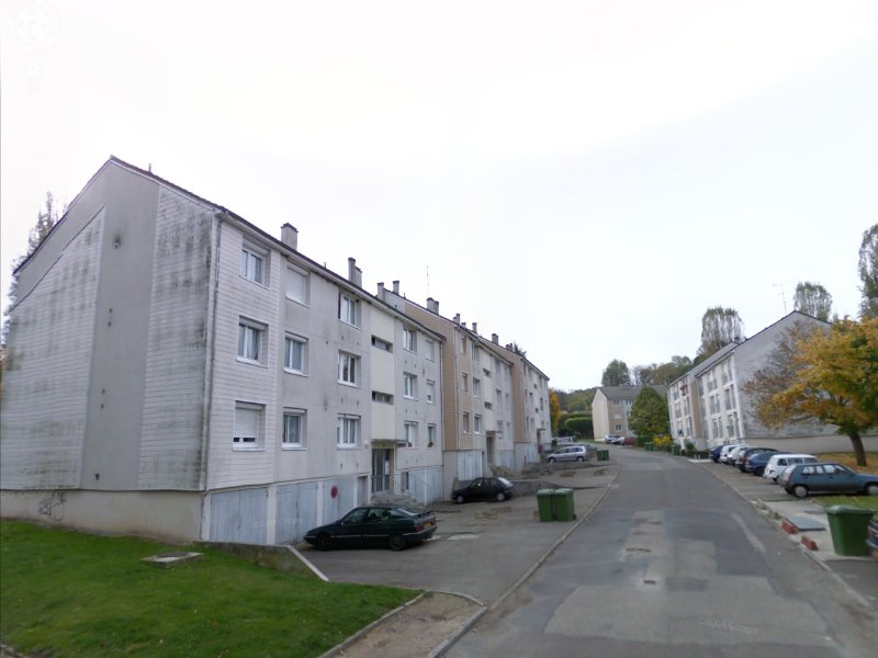 Orangerie